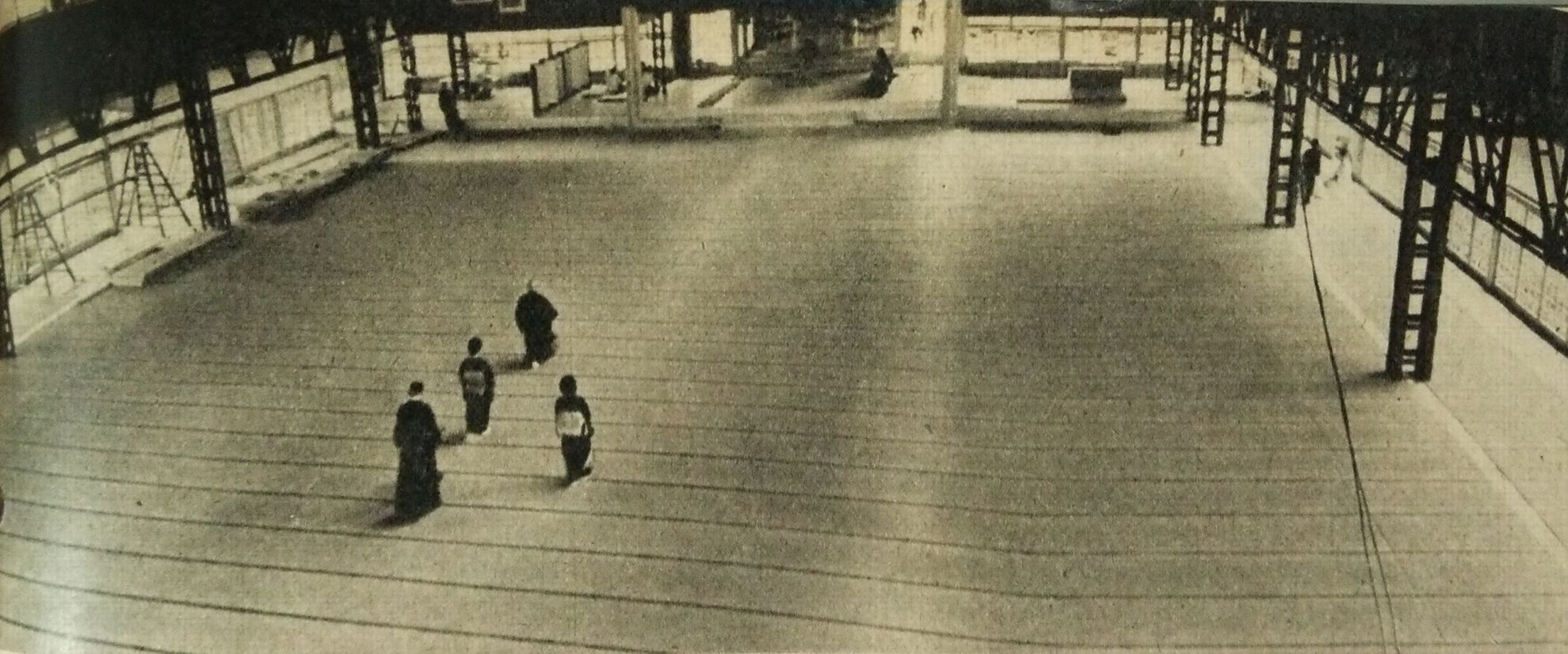 大本梅松苑内、みろく殿